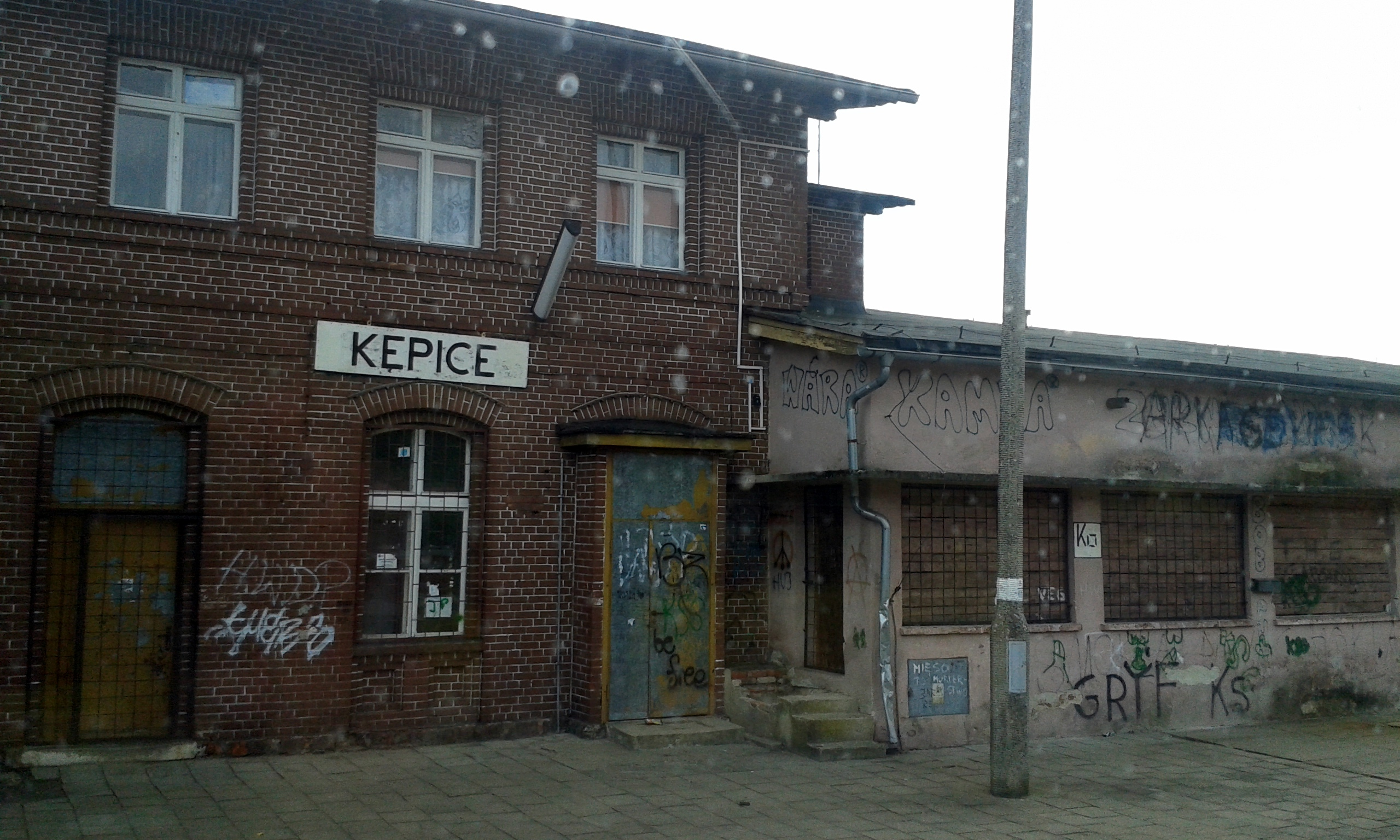 Przystanek kolejowy Kępice